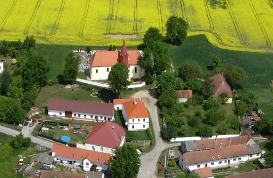 Kostel Nanebevzetí P. Marie (Drahov), Drahov